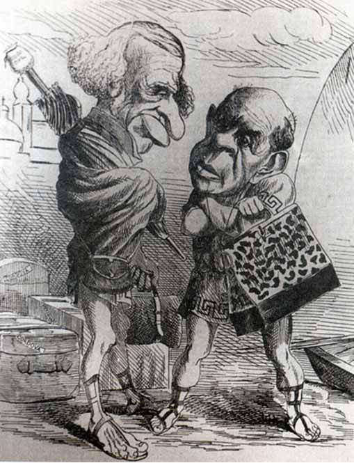 Caricatura de Domingo Faustino Sarmiento y Dalmacio Vélez Sarsfield